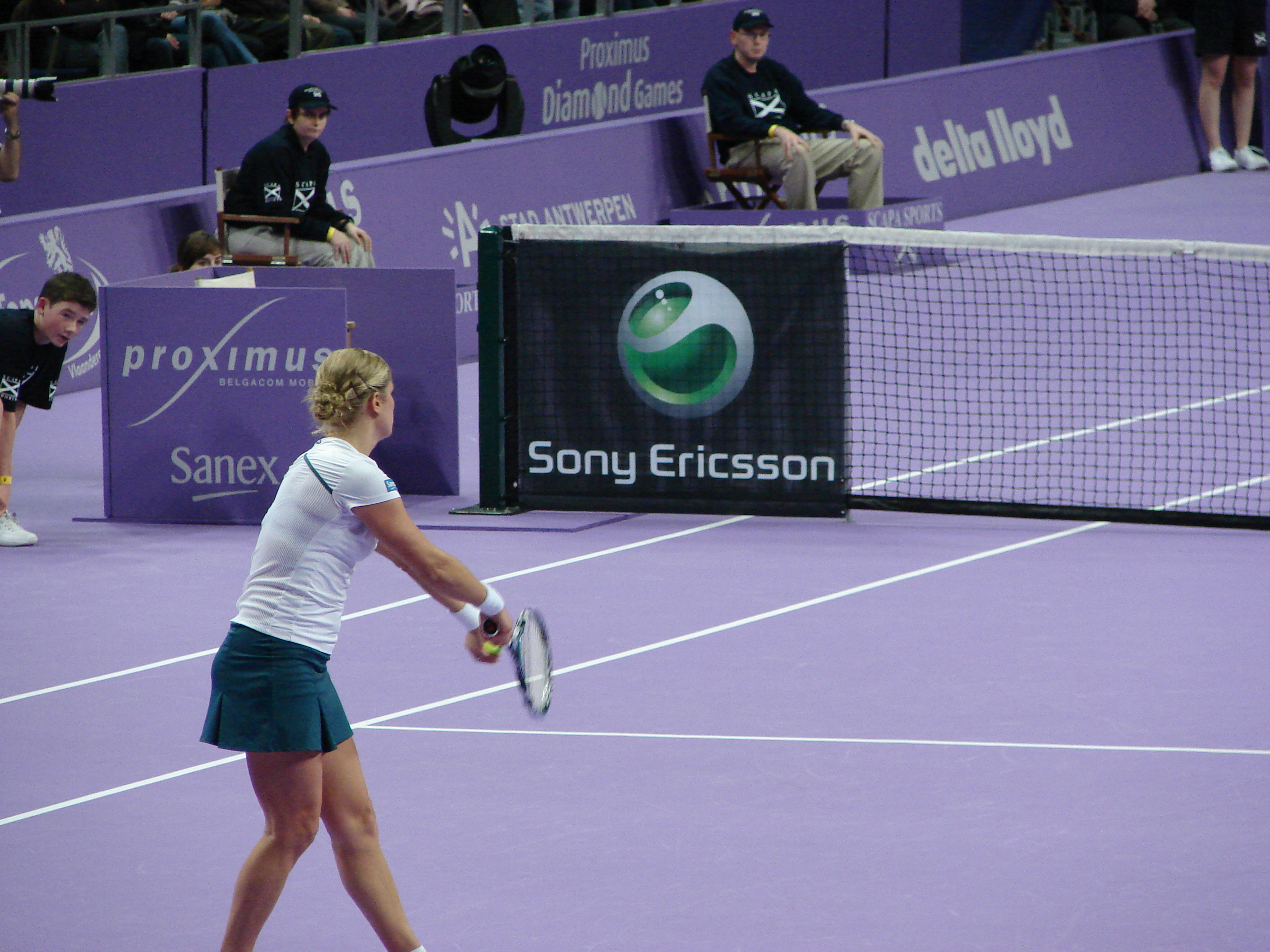 Kim Clisters, Anvers 2007